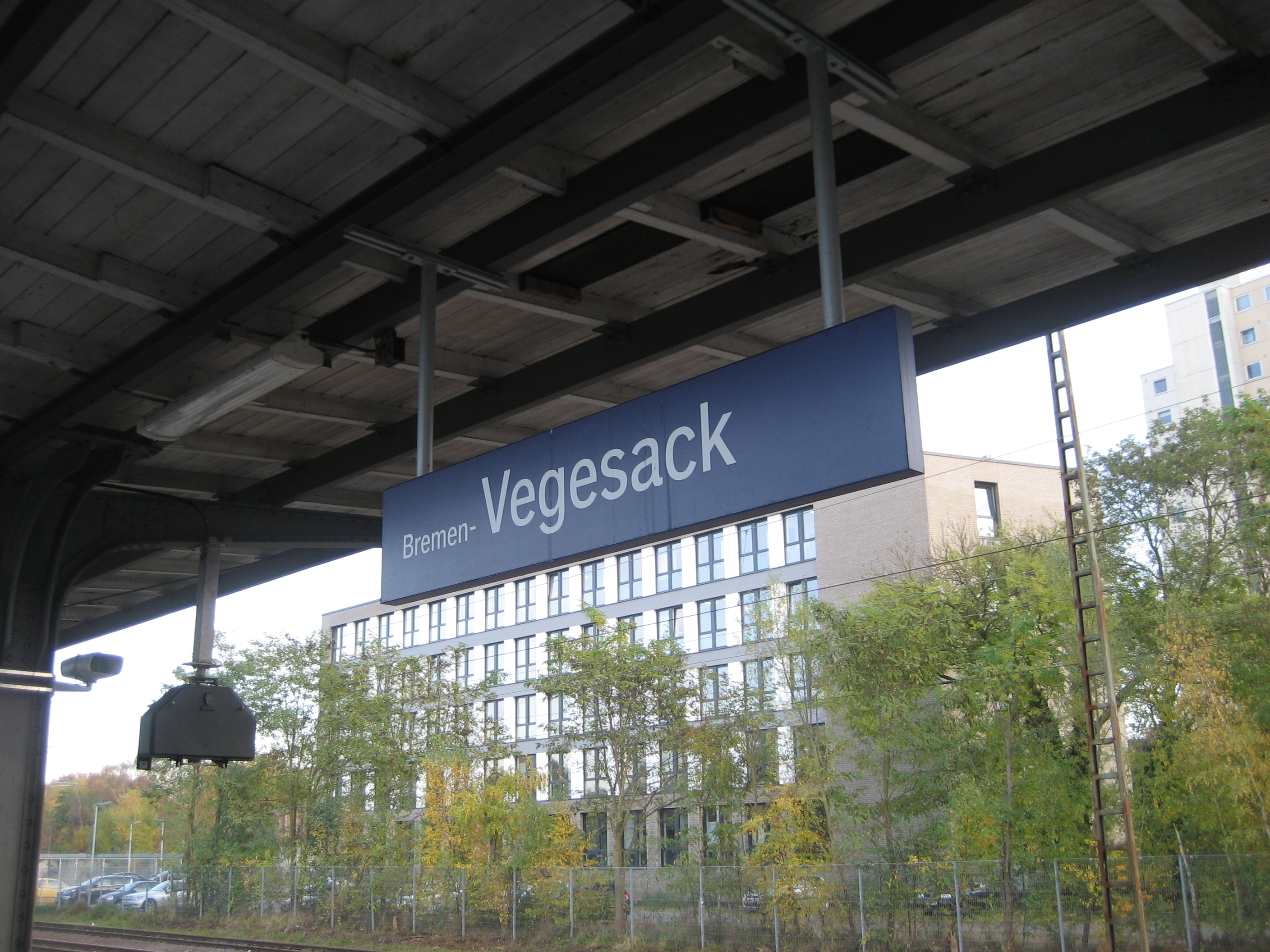 Bahnhofsschild von Bremen-Vegesack